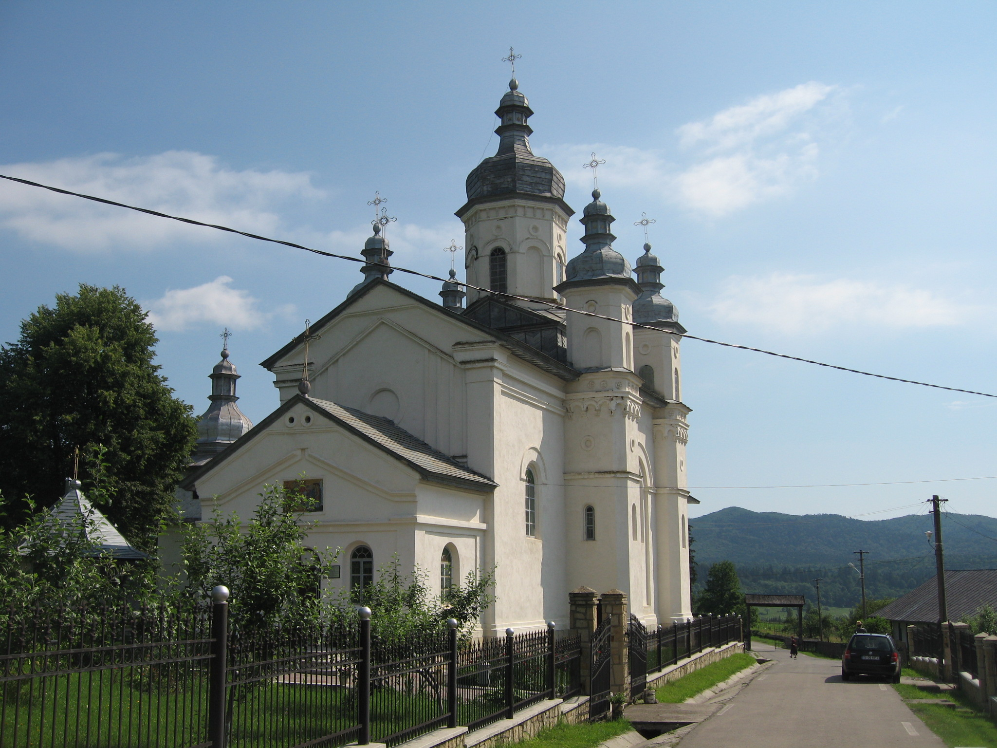 Schitul Vovidenia